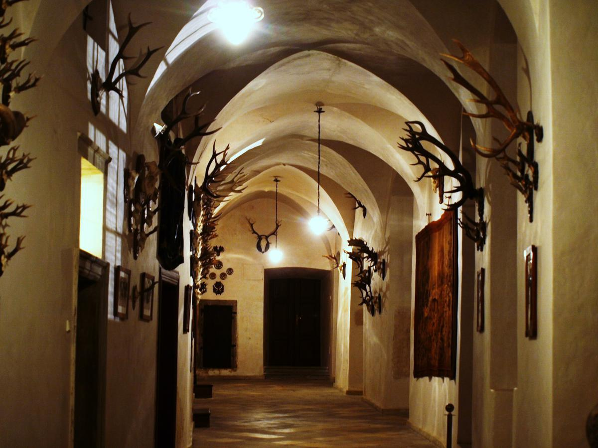 Zámek Brandýs interiér2